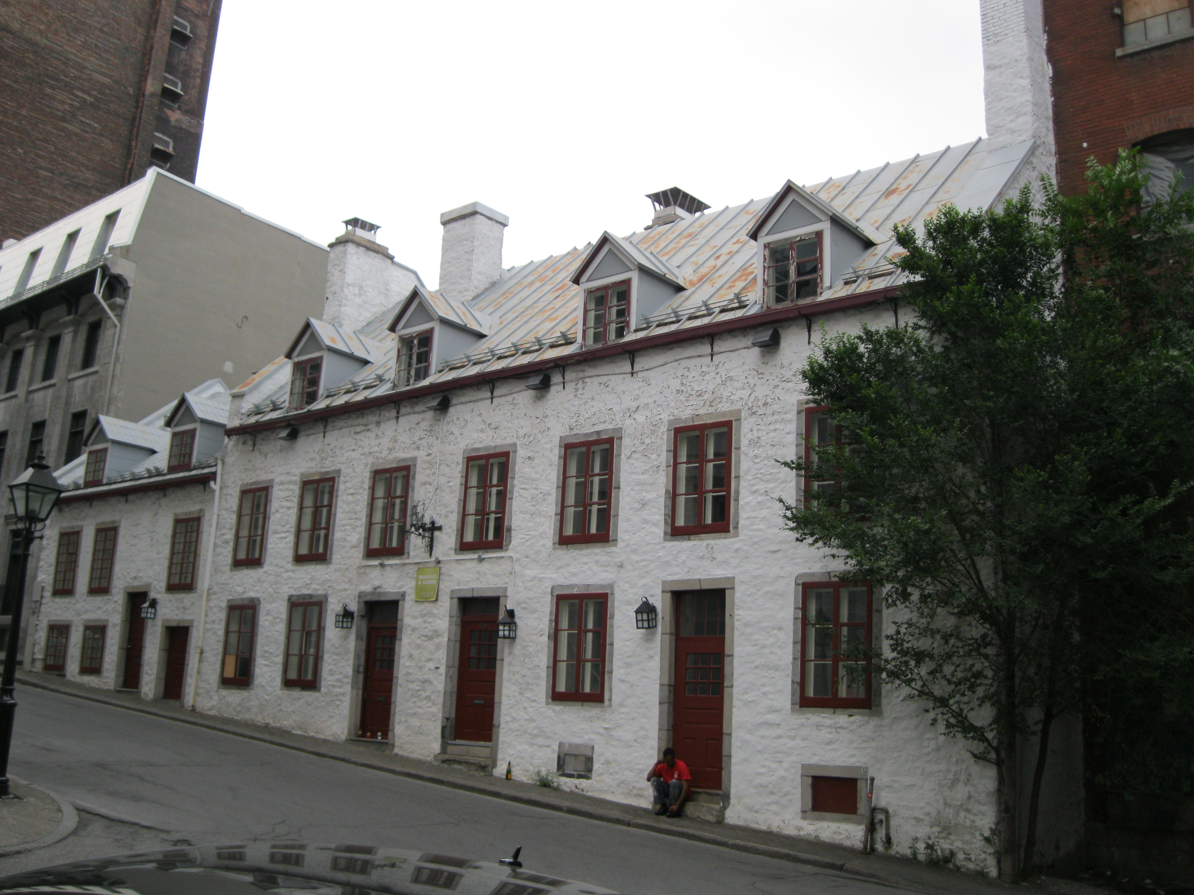 Les maison et entrepôt Edward-William-Gray, classés en 1968, est un ensemble formé de deux bâtiments de pierre érigés dans le dernier quart du XVIIIe siècle. Trois adresses : 427, 431 et 437, rue Saint-Vincent, dans le vieux-Montréal.